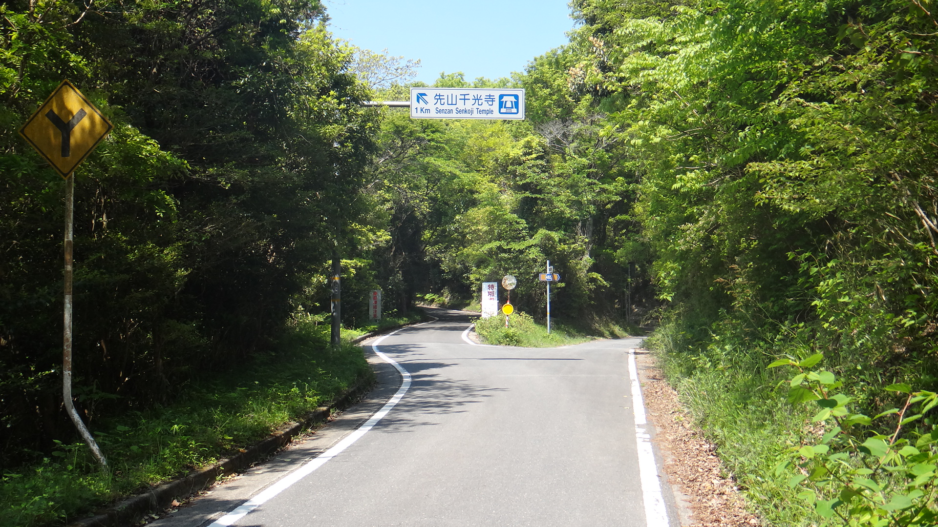 兵庫県道465号洲本市中川原町安坂先山向かう市道との接続部